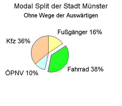 Modal Split der Stadt Münster ohne Wege der Auswärtigen. Die Zahlen beruhen auf